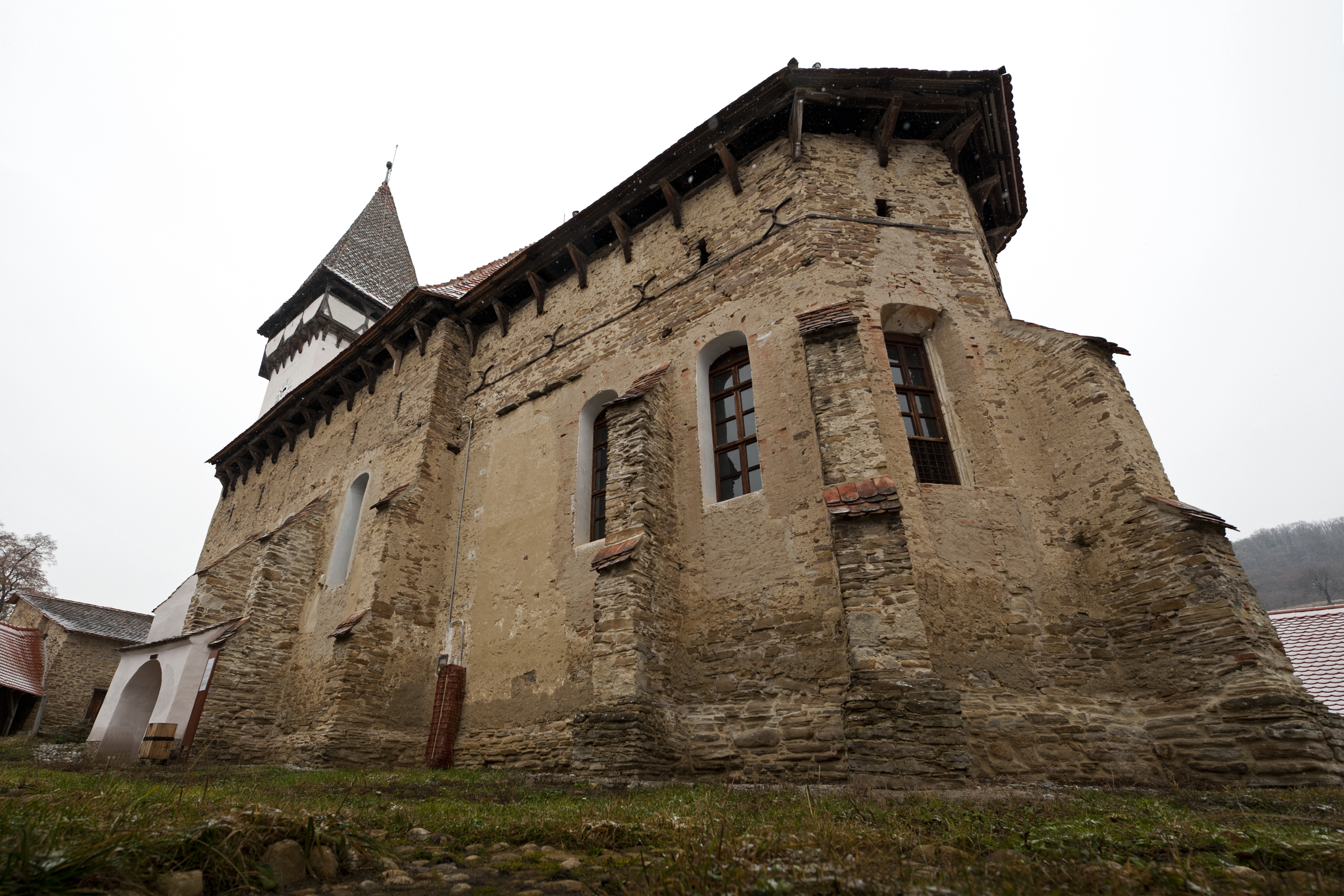 Biserica evanghelică 01